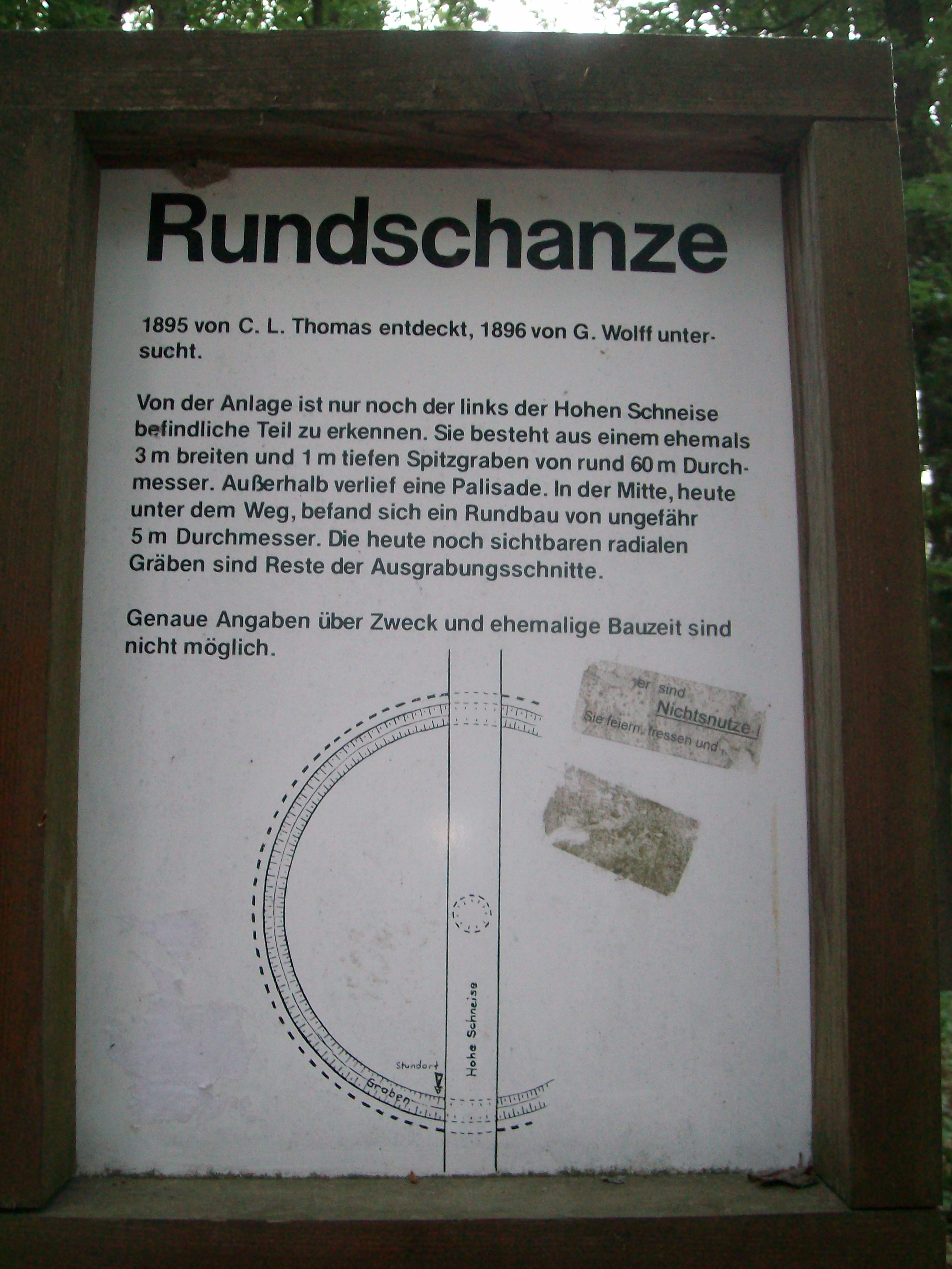 Beschreibung der kleineren Rundschanze